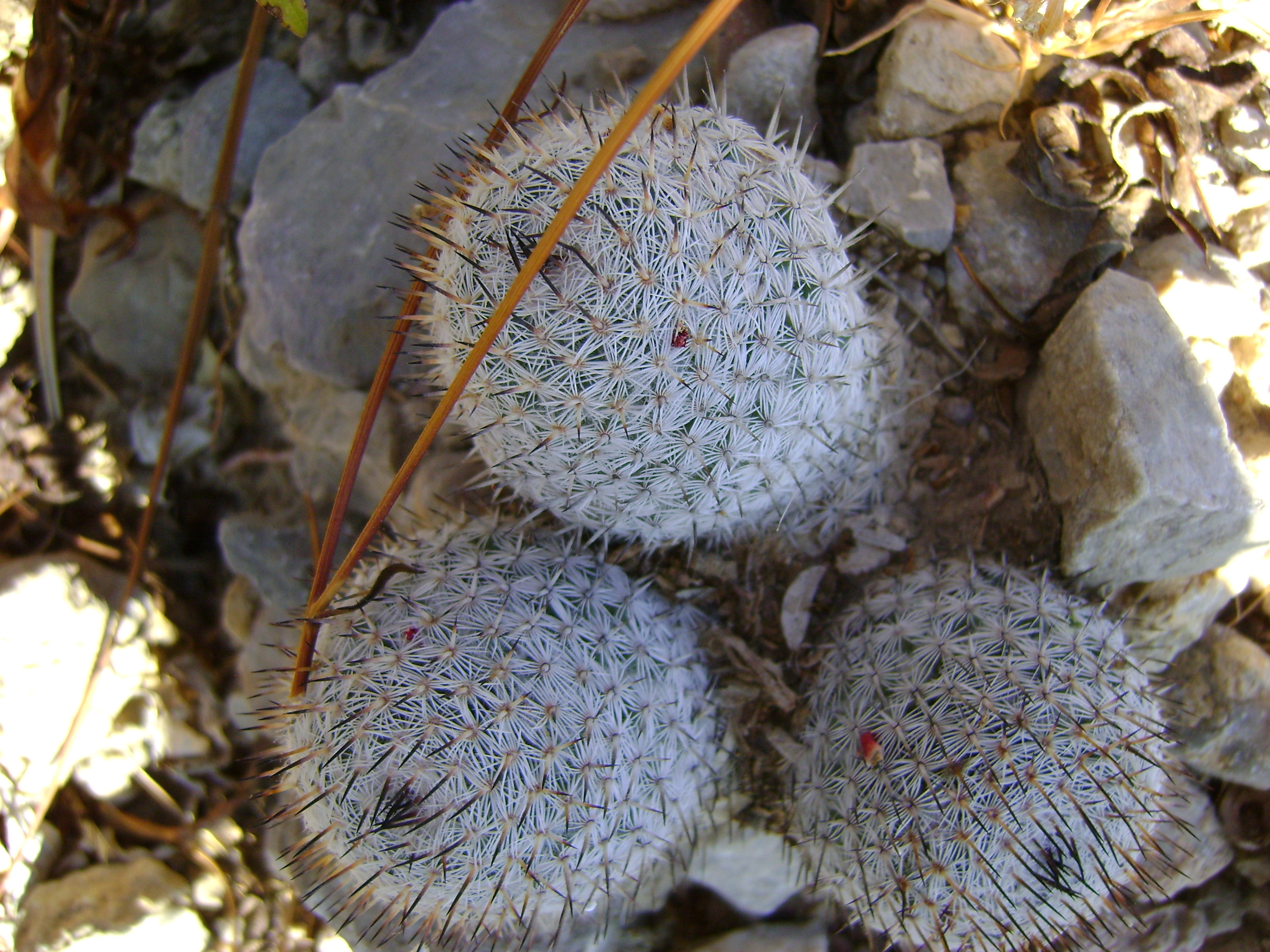 Zapotitlan De Las Salinas, Puebla